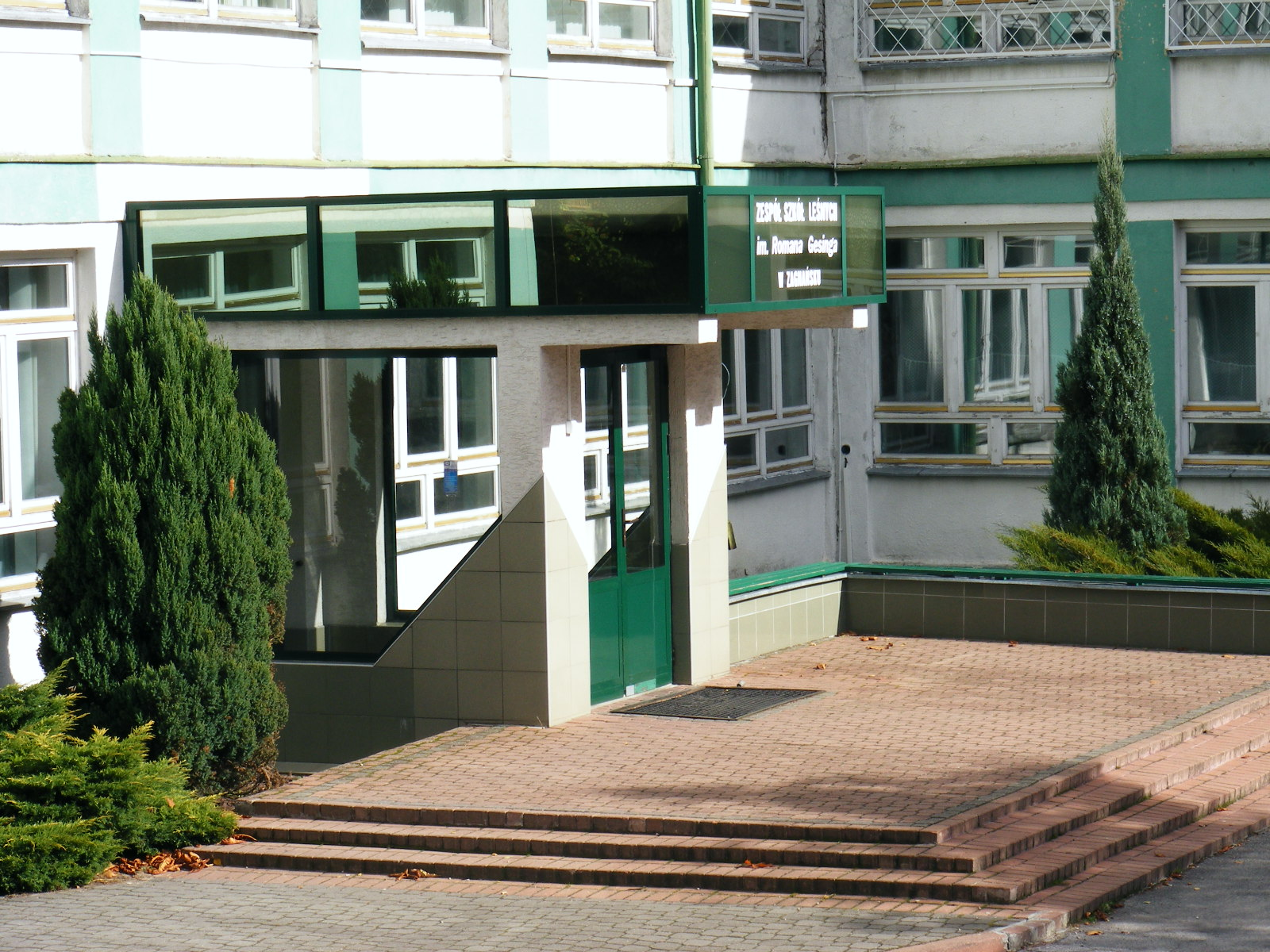 Technikum Leśne w Zagnańsku